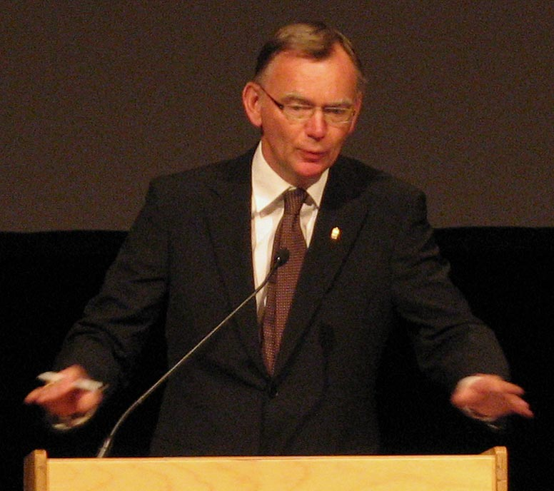 Governor Lars Bäckström of Västra Götaland County, Sweden.